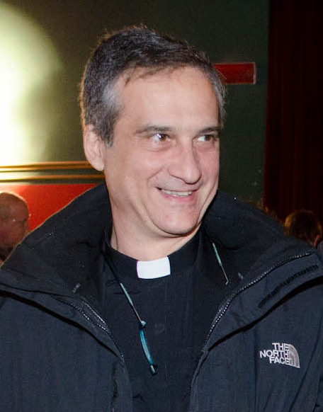 Monsignor Dario E. Viganò con Ermanno Olmi